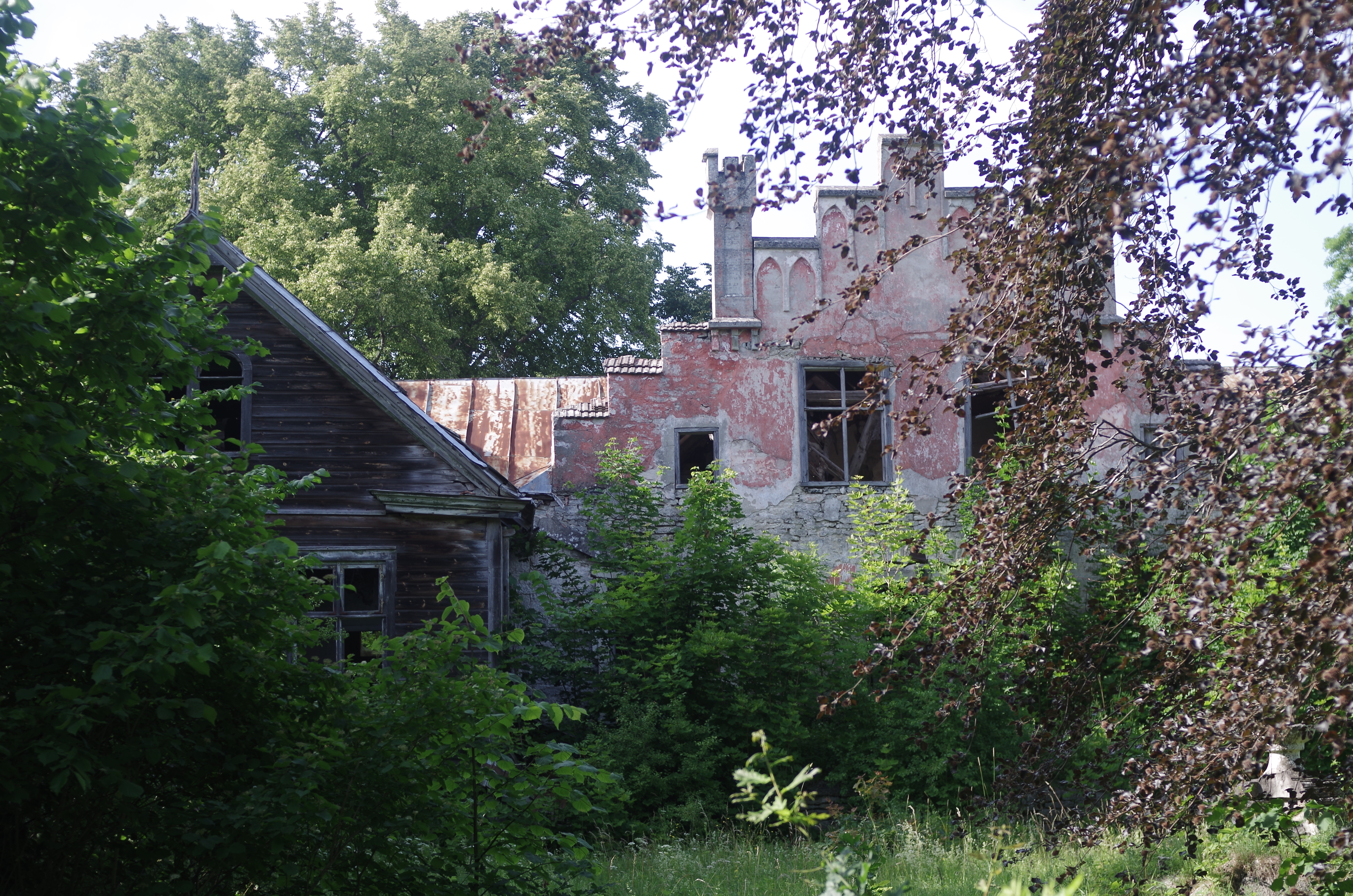 Pihtla mõis Saaremaal Pihtla vallas. (Foto: 2014)